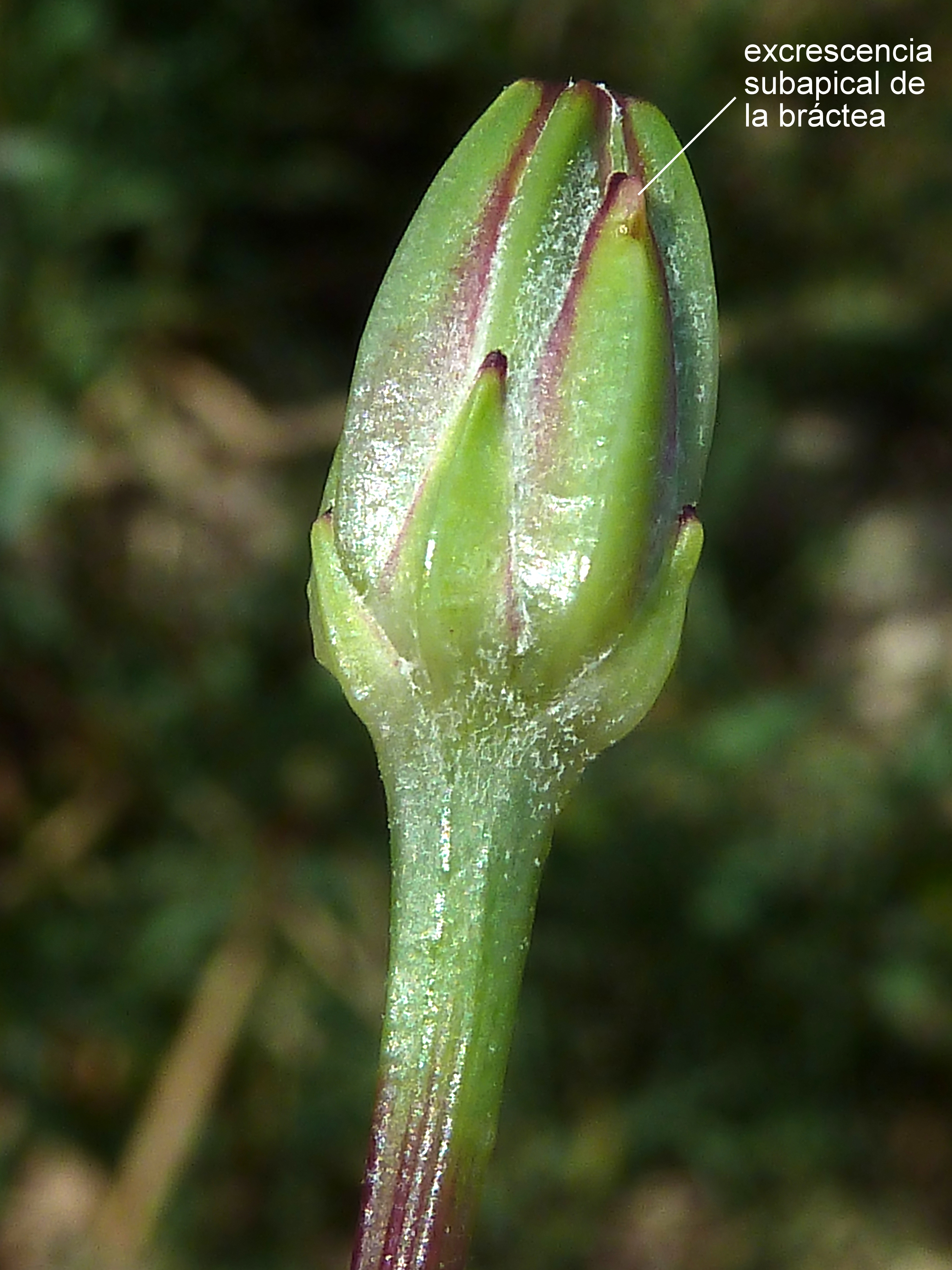 Podospermum laciniatum - Capítulo en preantesis. - La Huerta, Albatera (Provincia de Alicante, España).